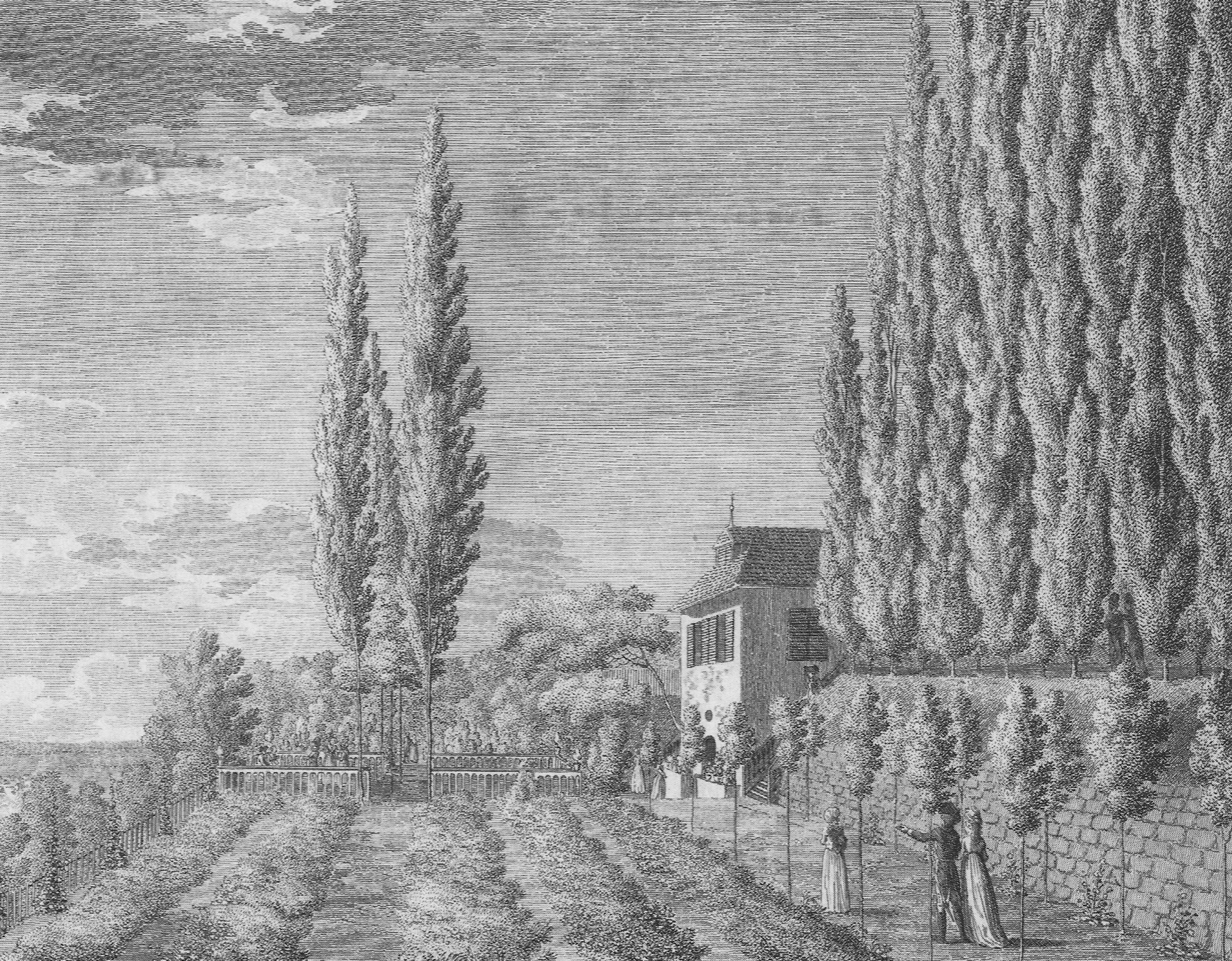 Der Welsgarten am Burgberg, Erlangen auf einer Darstellung aus dem Jahr 1797